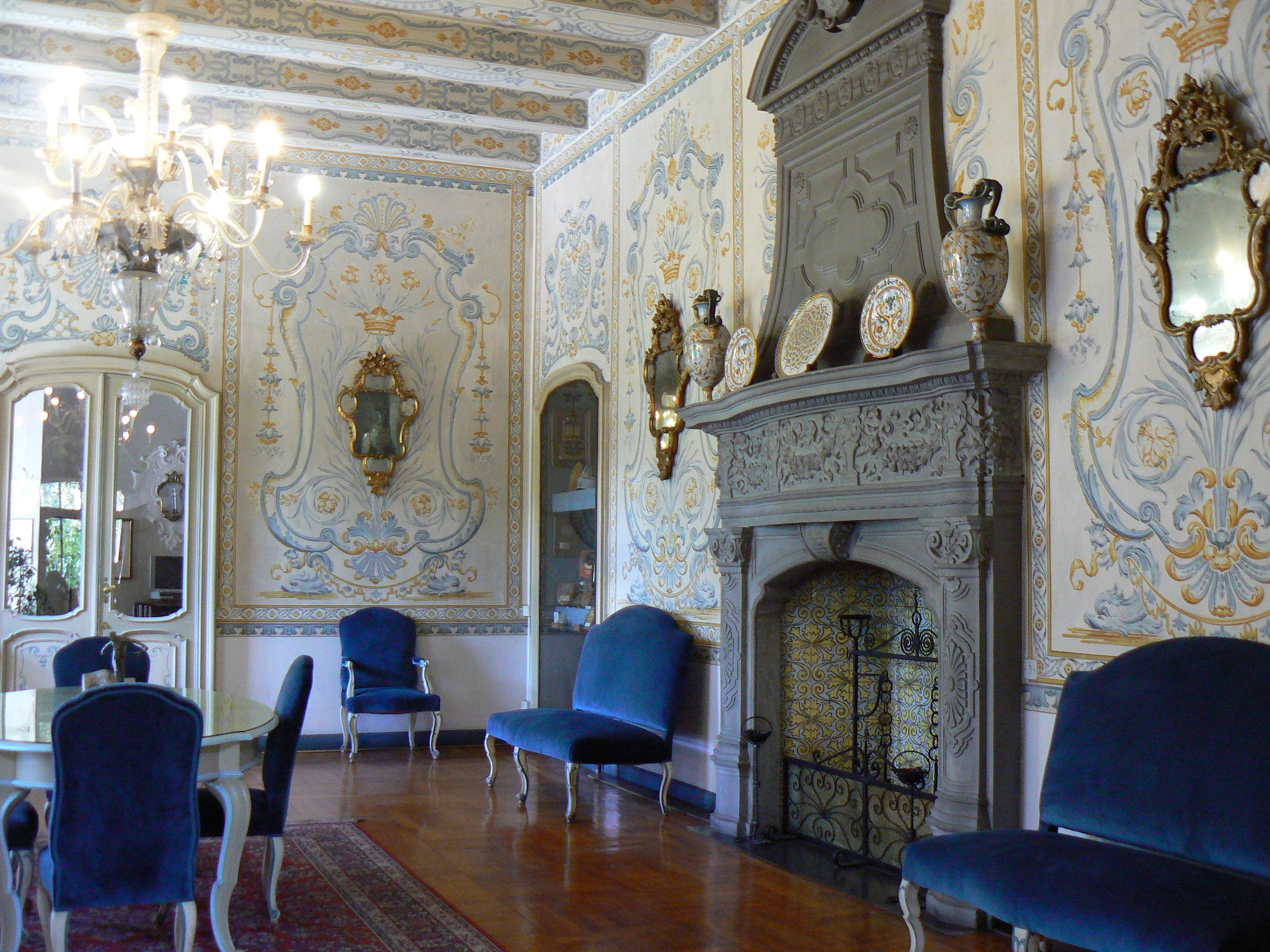 sala del Castello Jocteau, Aosta, Valle d'Aosta, Italia.